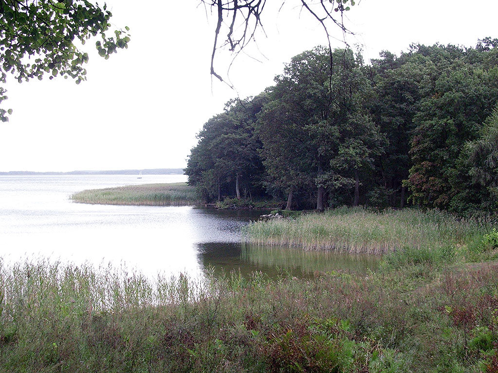 Sexter-See, Masurische Seenplatte, Woiwodschaft Ermland-Masuren, Polen.